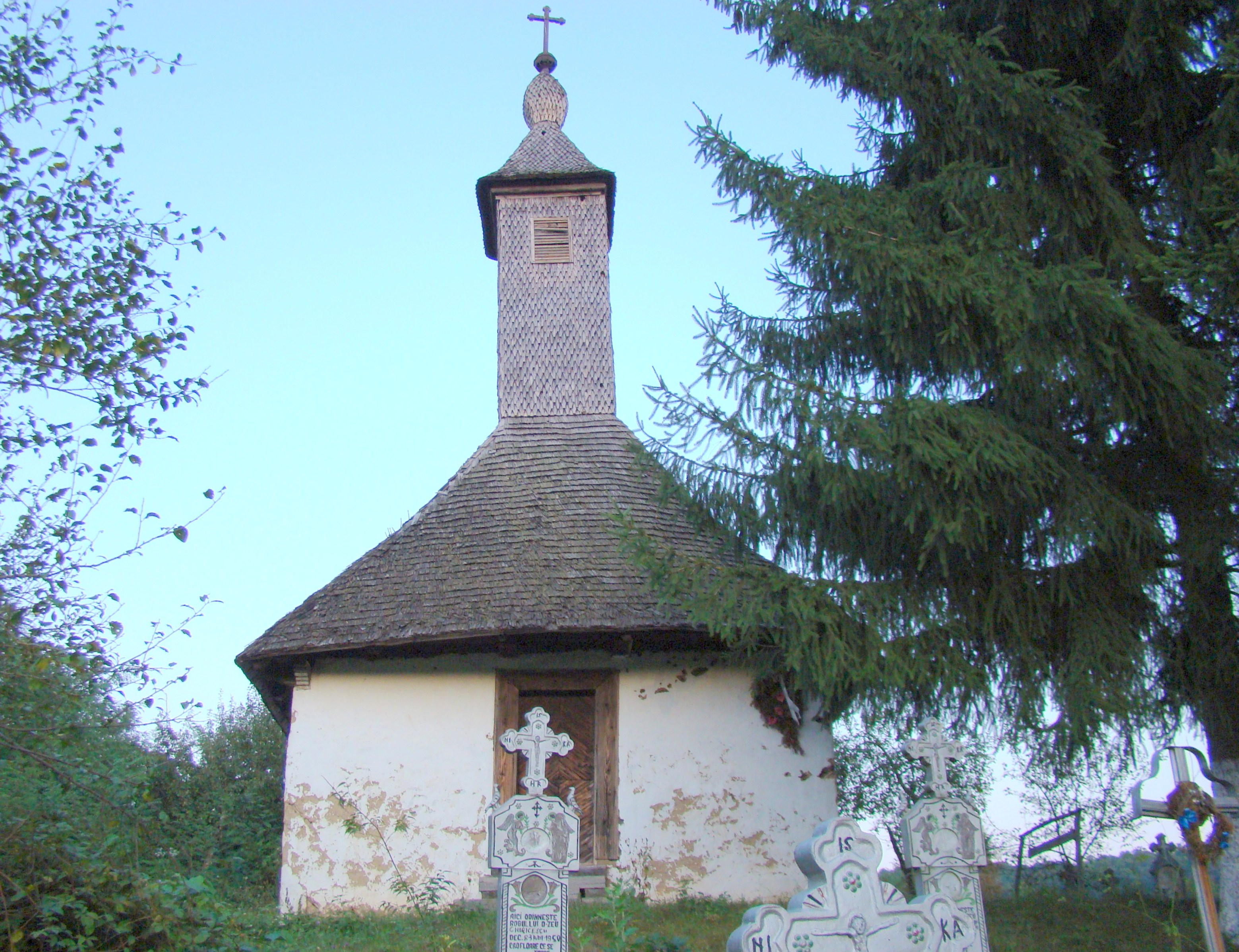 Biserica de lemn din Povârgina, oraș Făget, județul Timiș